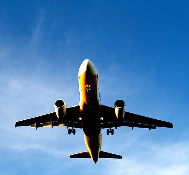 Cebu Pacific Airbus A???